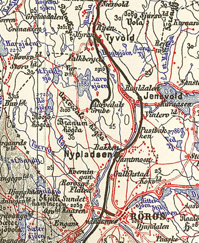 Kart over Arvedalslinjen, Røros